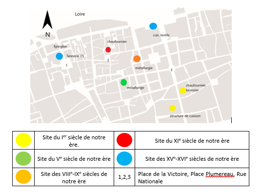 Cartes construite à partir de GALINIÉ Henri (dir.), Tours antique et médiéval. Lieux de vie. Temps de la ville. 40 ans d’archéologie urbaine, Tours, RACF, 2007, p. 115-116 et 157